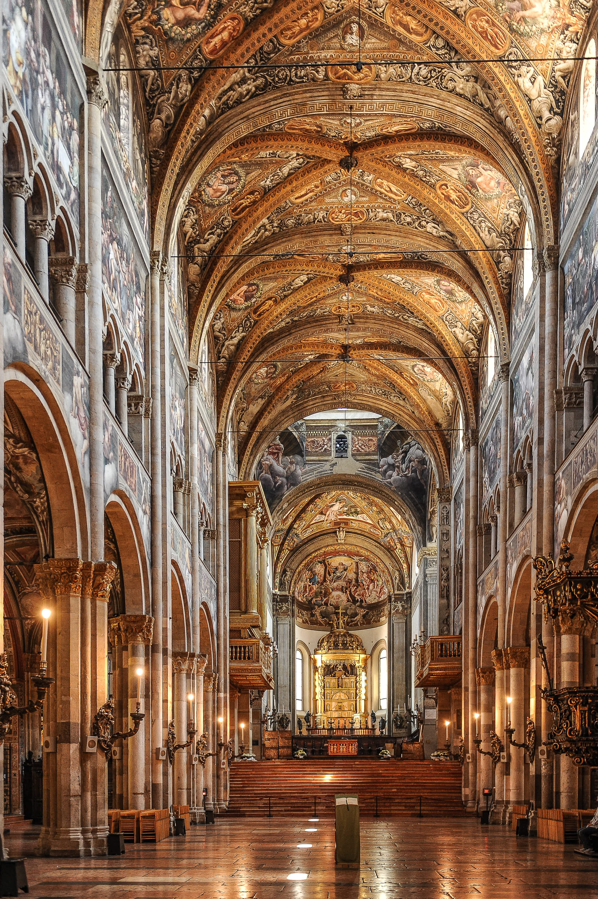 Cattedrale di Parma, Parma, Italy